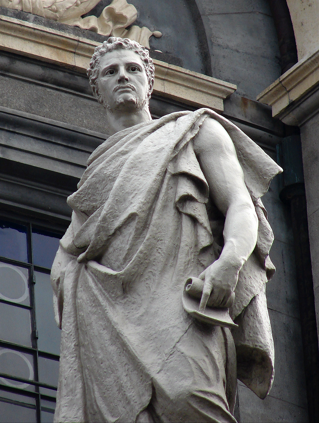 Athanasius, Carl Rohl Smith, 1883-84, Frederikskirken, København